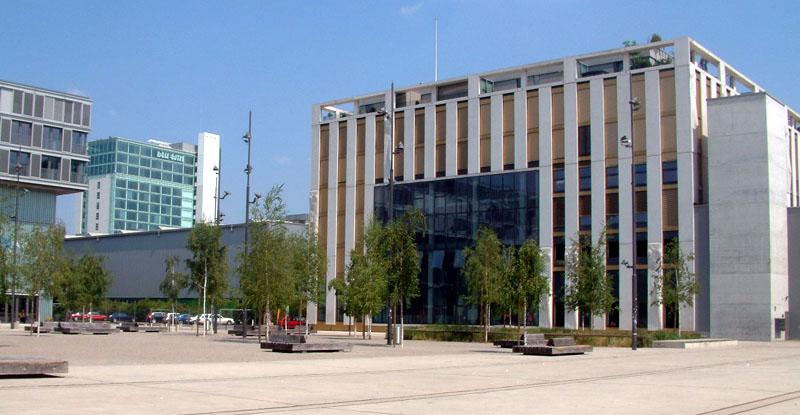 Bürogebäude und Schiffbau (Schauspielhaus Zürich) am Turbinenplatz